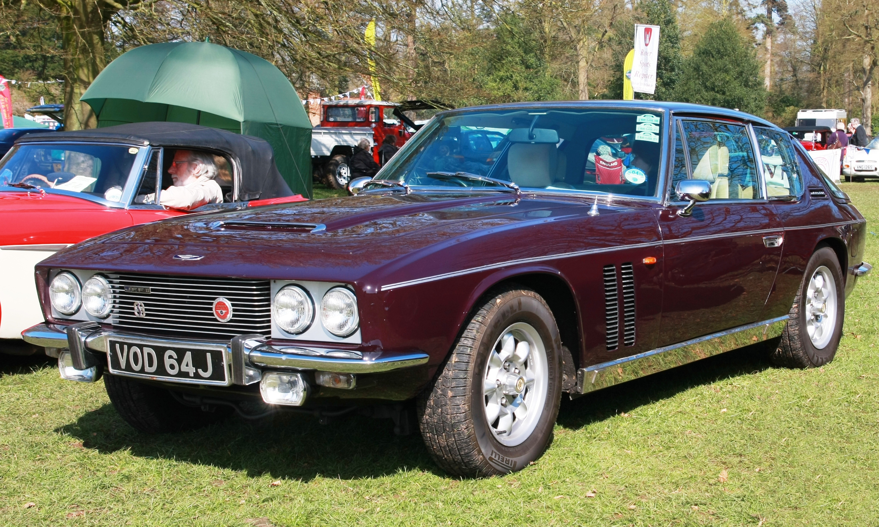 Jensen FF (1988) at Weston